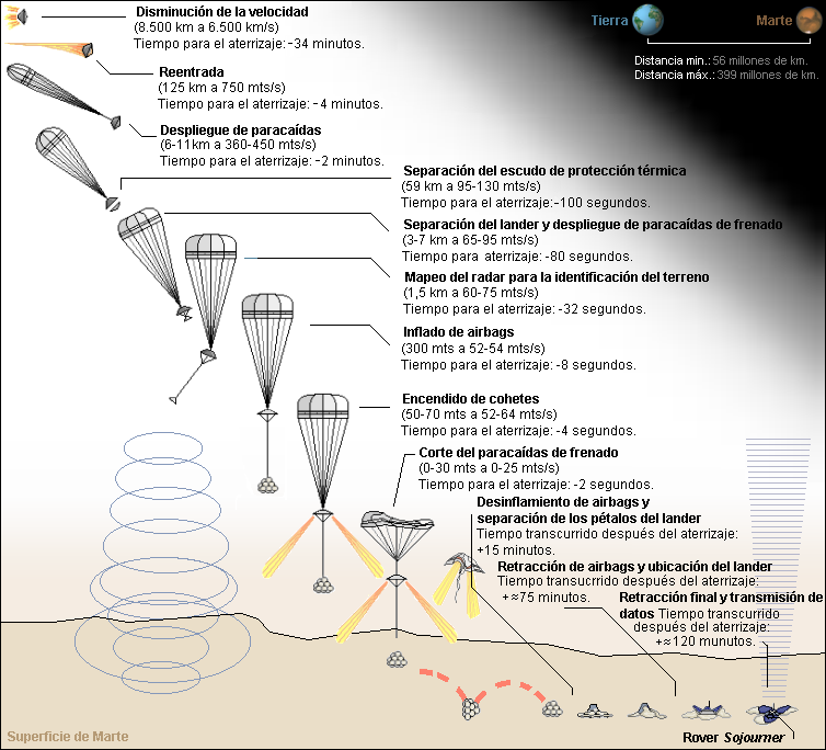 Descripción: Diagrama de descenso del Mars Pathfinder. Autor: Lmb. Estatus de copyright: Libre. Enlaces relacionados: Marte, Sondas interplanetarias estadounidenses.